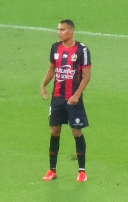 Kolo.